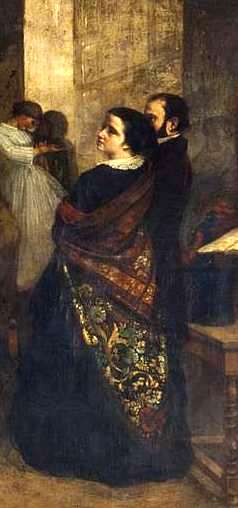 detail: couple Sabatier